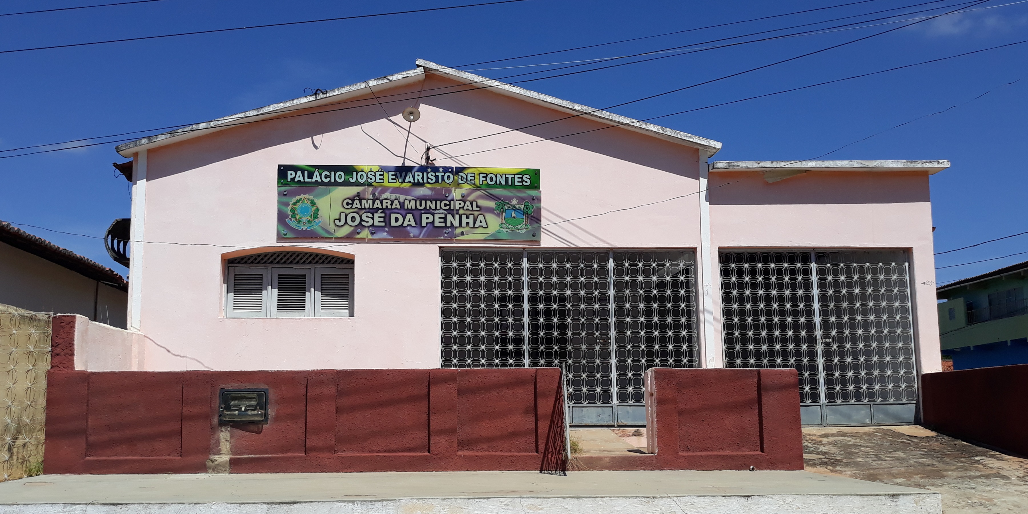 Palácio José Evaristo de Fontes, onde funciona a câmara de vereadores de José da Penha, Rio Grande do Norte (Brasil)